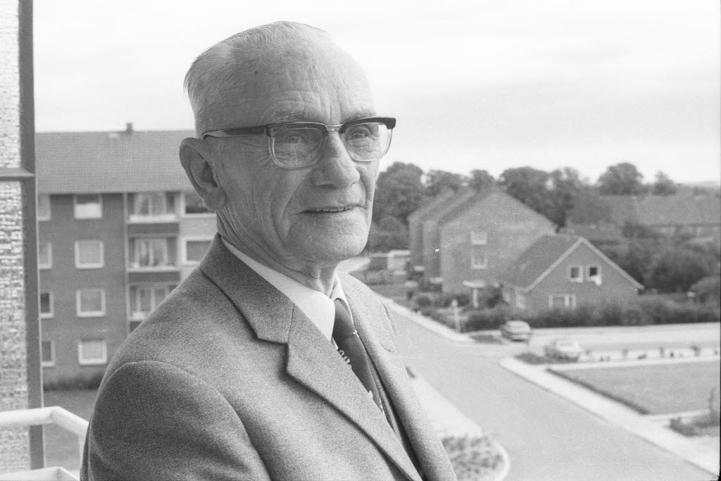 feiert 80. Geburtstag. Der in Gaarden geborene Steffen und sein Bruder Franz widmeten sich bereits vor dem 1. Weltkrieg dem Fliegen und der Flugzeugkonstruktion. In Kronshagen, wo er seit langem lebt, ist Steffen außerdem als Wirt des ehemaligen Ballhauses Brunos Lust bekannt.